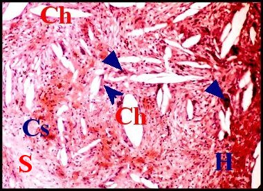 Dépôts de cholestérol près d'un foyer hémorragique dans un cholestéatome